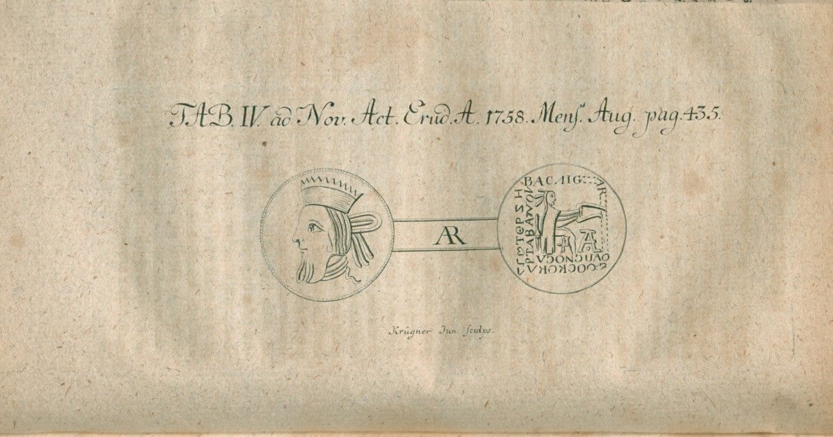 Illustration